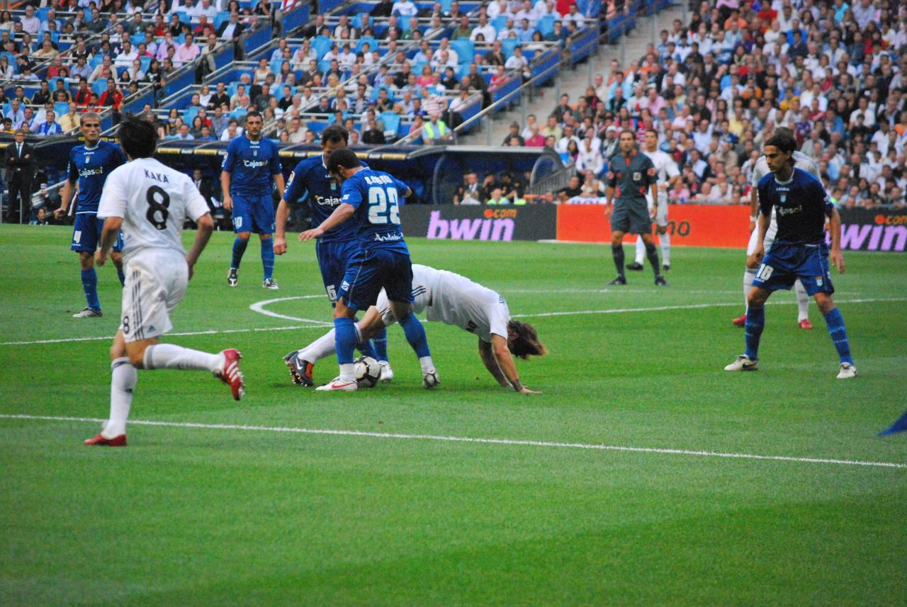 Real Madrid 5 - Xerez 0 20/9/09